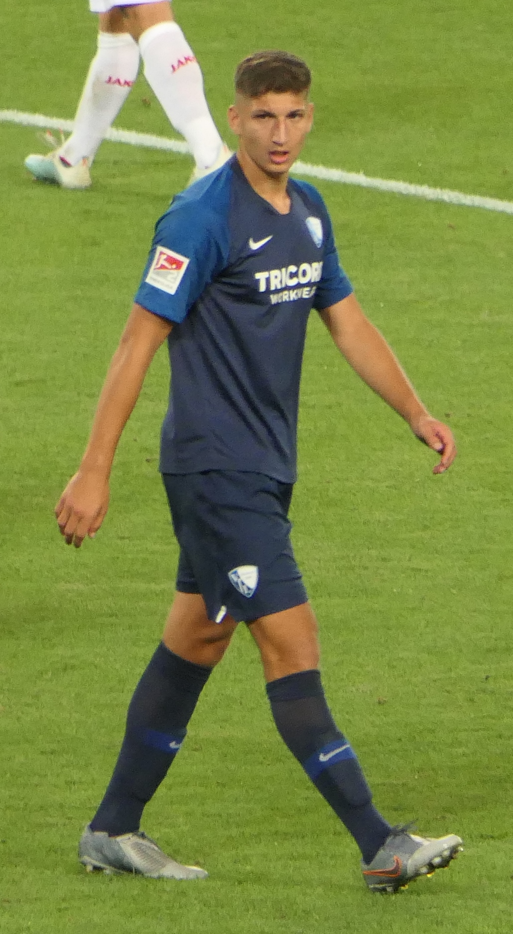 Der Fussballprofi Vitaly Janelt im Trikot vom VfL Bochum beim Auswärtsspiel gegen den VfB Stuttgart am 02.09.2019.